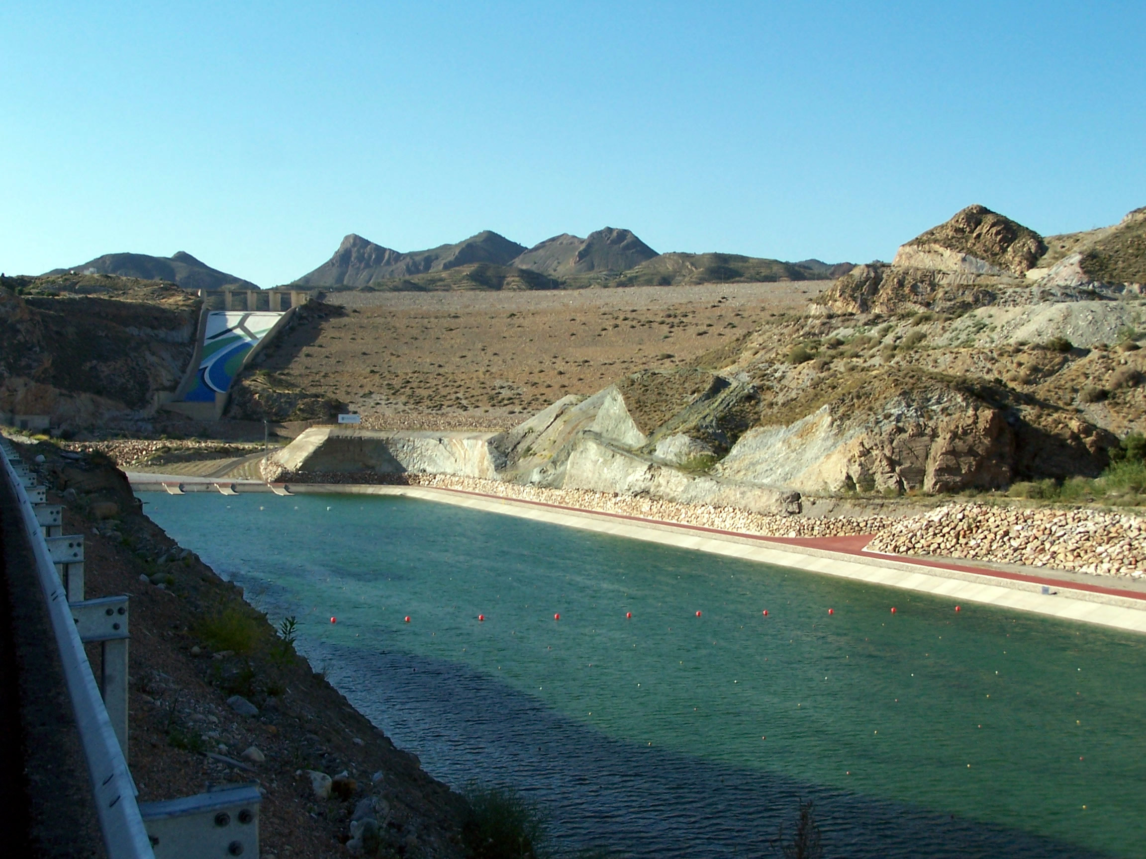 Vista de la presa del embalse de Cuevas del Almanzora y, en primer término, el canal de remo y piragüismo.